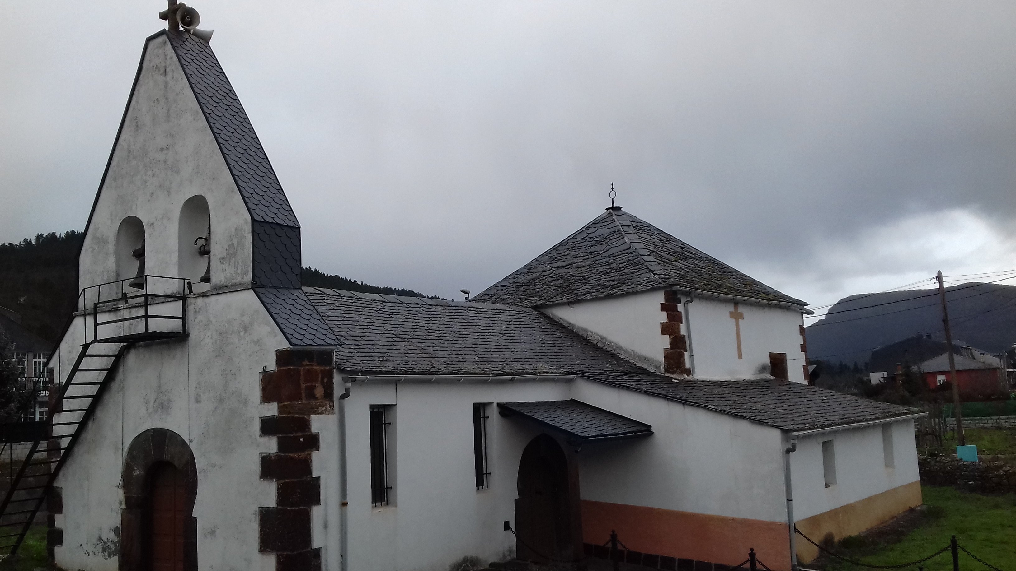 Igrexa de Quereño, Rubiá